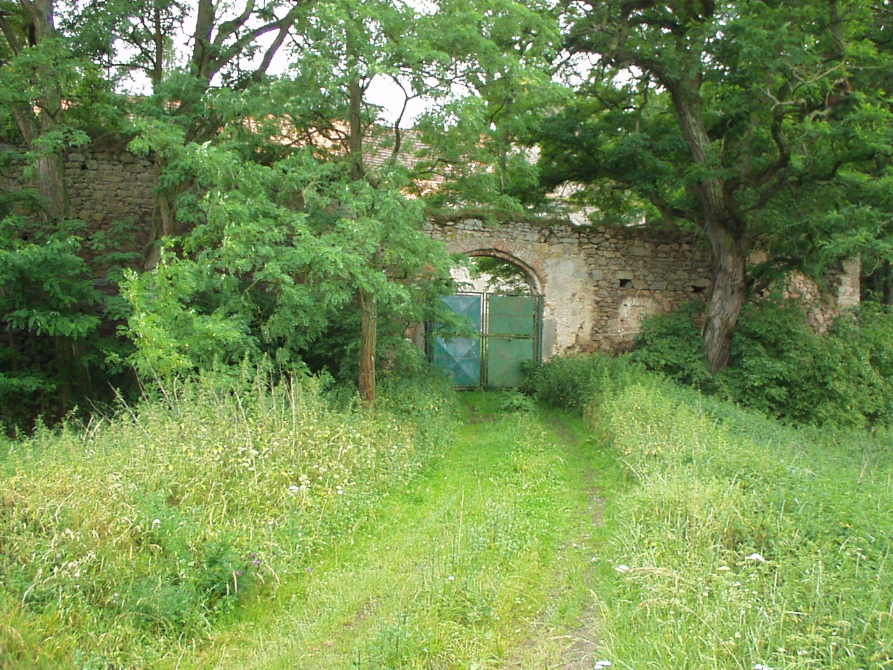 vjezd do tvrze v Buzicích